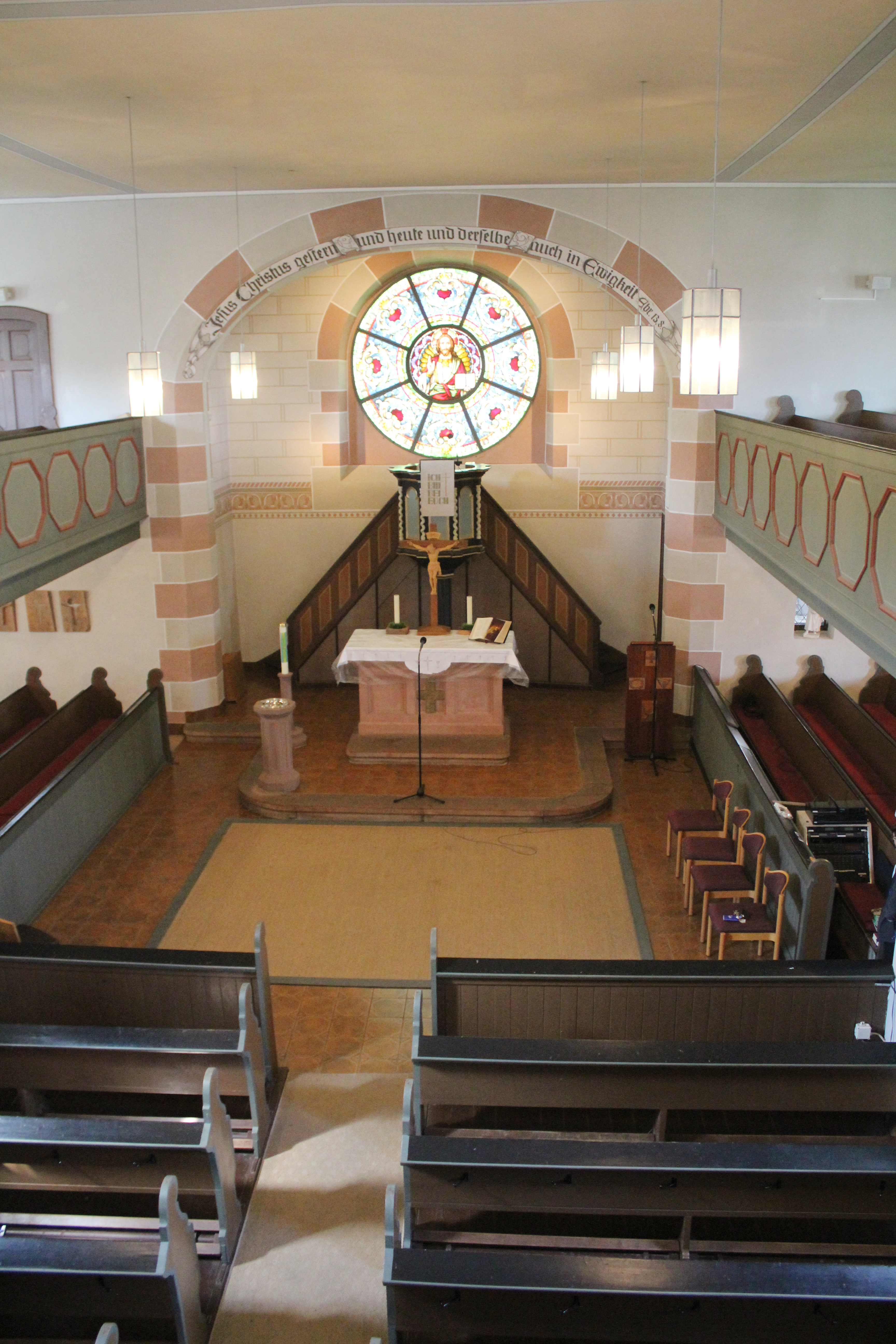 Evangelische Kirche Wetzlar-Dutenhofen, Lahn-Dill-Kreis, Hessen, Deutschland